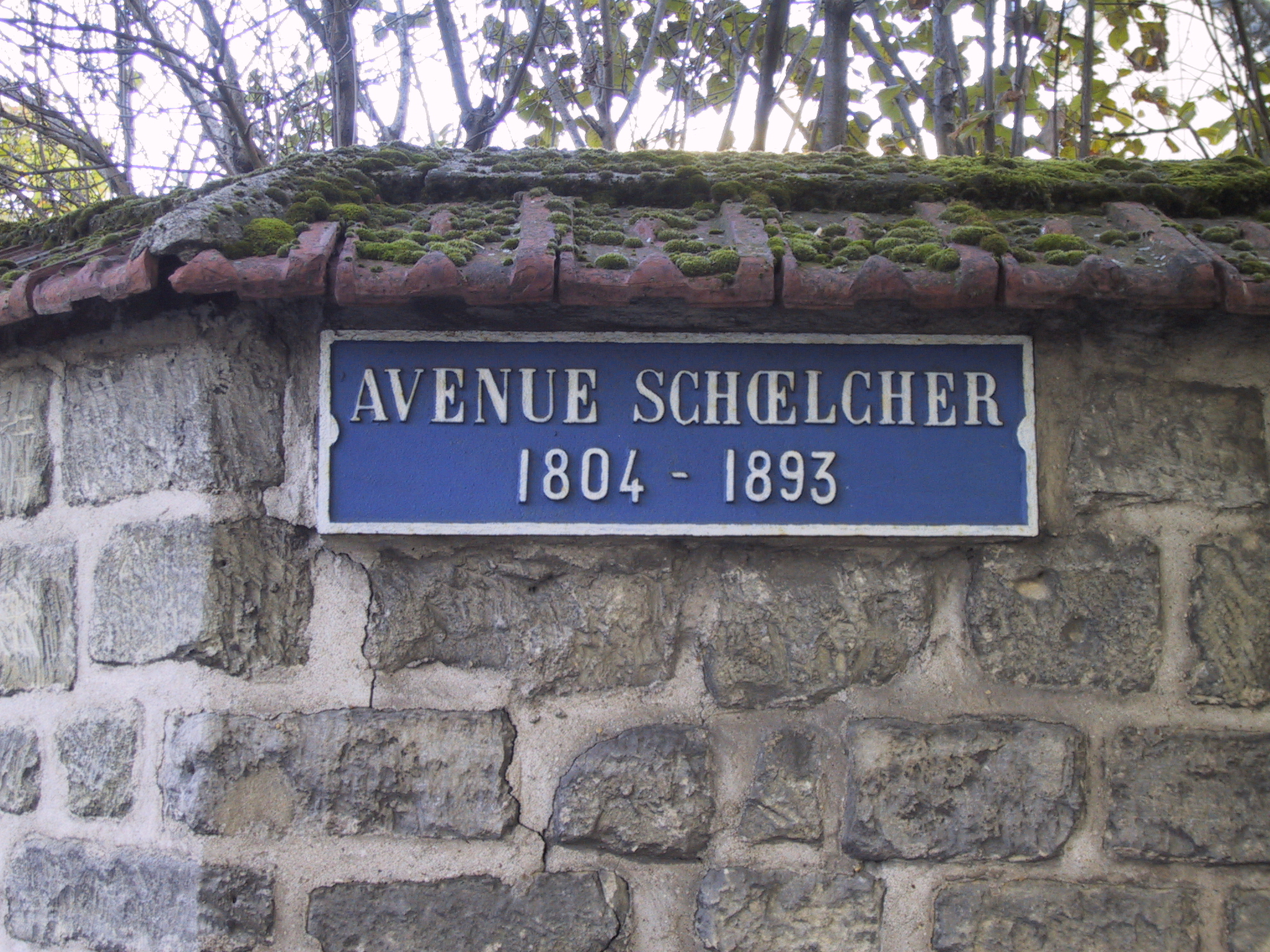 Plaque de rue sur un mur de pierre surmonté de tuiles moussues. Inscription sur la plaque: "Avenue Schœlcher 1804-1893". Photo prise à Houilles, France à l'angle de l'avenue Schœlcher et de l'avenue de la République le 18 novembre 2005. Source: J'ai pris cette photo moi-même. Auteur: Cédric Filhol